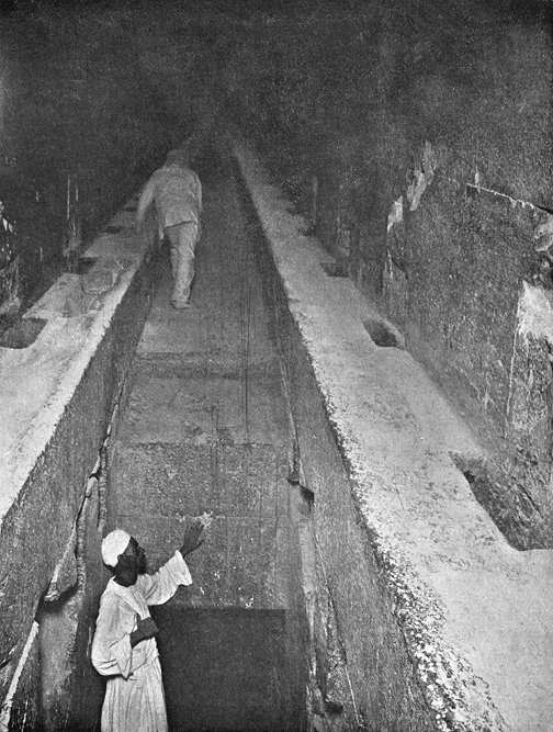 embranchement de la grande galerie dans la pyramide de Khéops